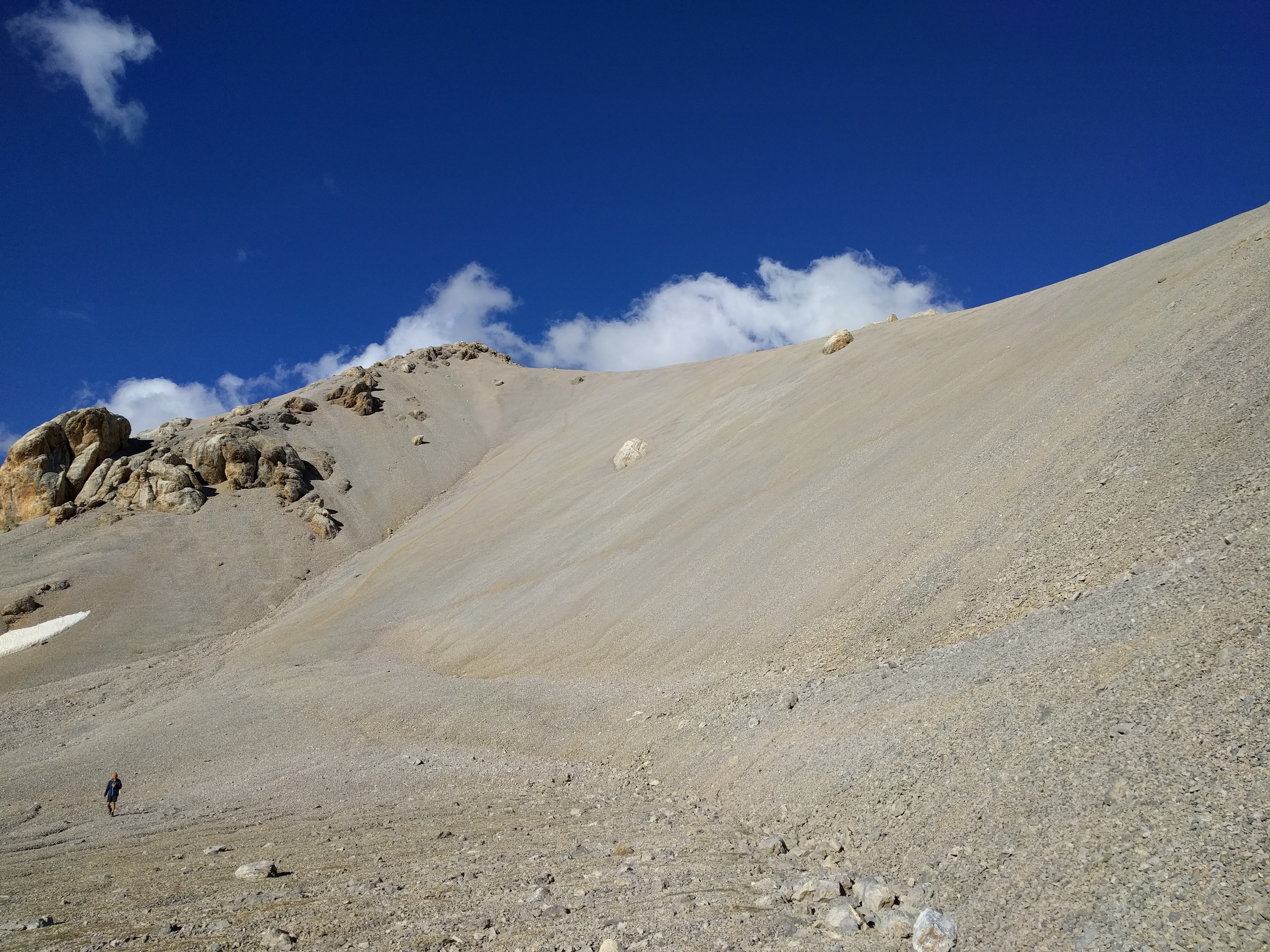 Pohled na vrchol Pik Vit